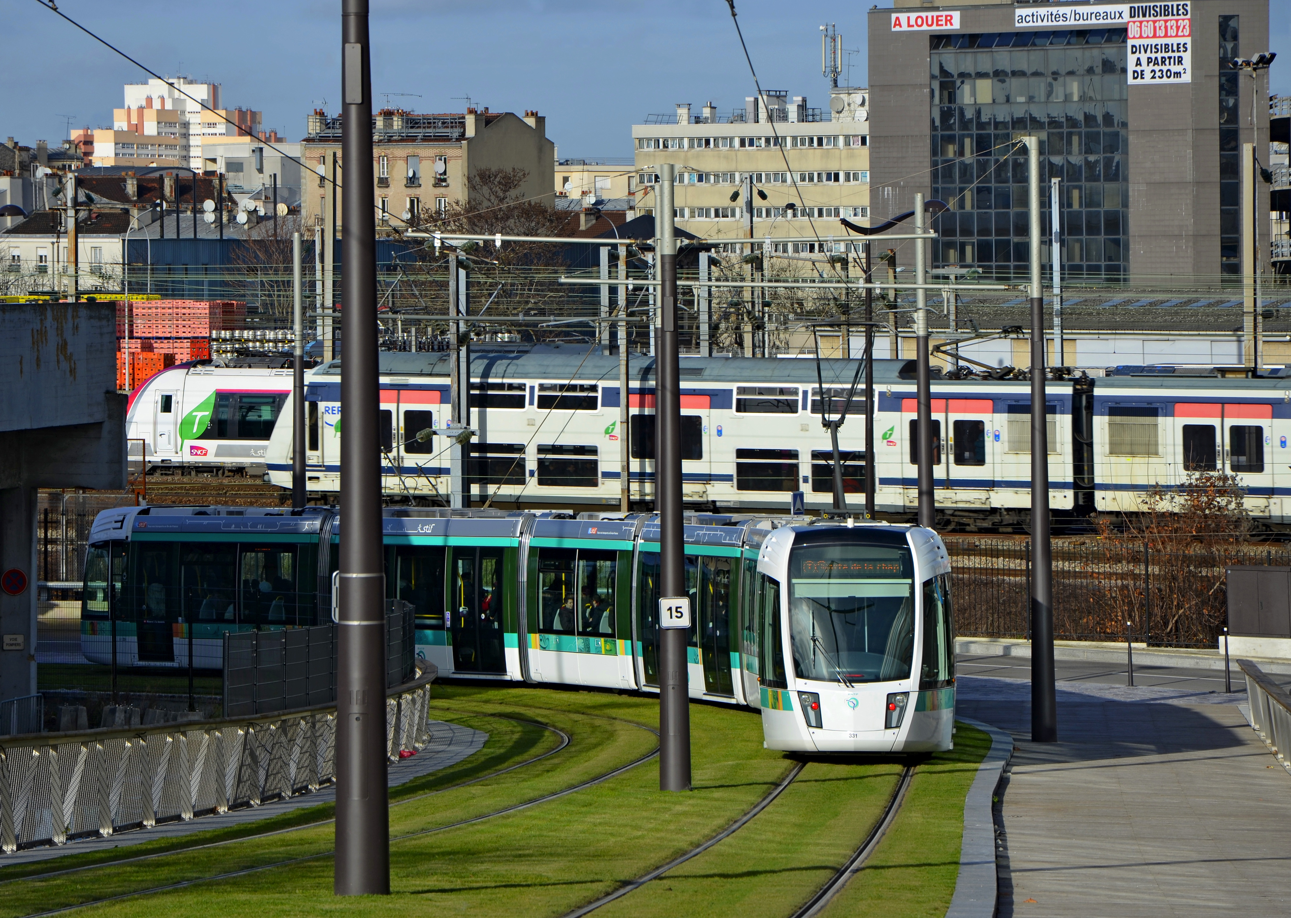 Rame de tramway de la ligne T3b près du canal de l'Ourcq, Paris, Ile de France, France. A l'arrière plan, une rame Z 22500 du RER E et derrière une Z 50000 en essais sur la zone de Paris-Est